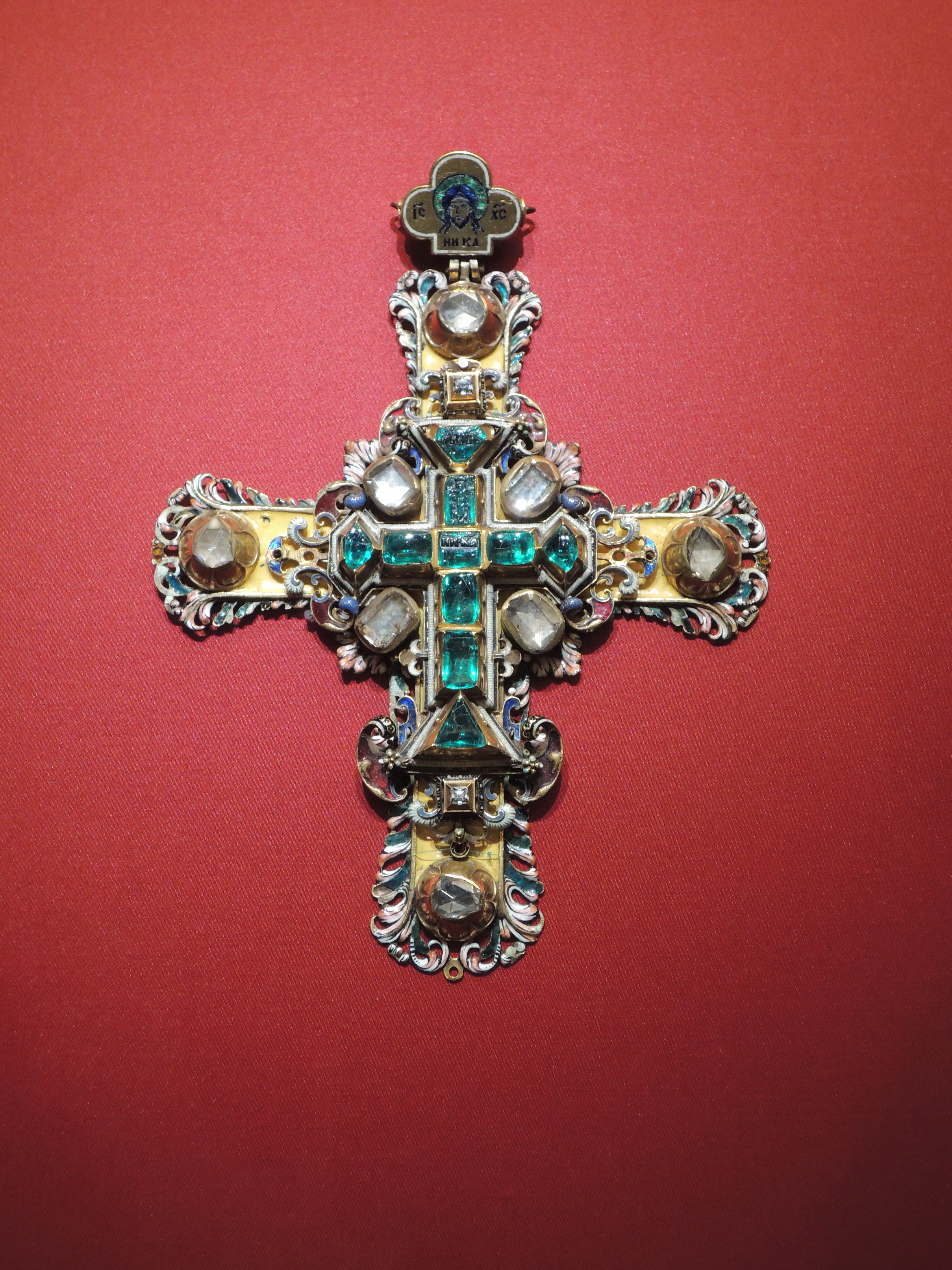 Наперсный крест царя Петра Алексеевича Москва, мастерские Кремля, 1672-1689. Накладной крест - Западная Европа, конец 16 века. Золото, алмазы, изумруды, литье, чеканка, эмаль, резьба. ММК Возможно, был создан в 1682 г., ко дню венчания на царство Петра. В центре оборотной стороны цветными эмалями выполнено изображение апостола Петра со свитком и ключом - небесного покровителя царя.